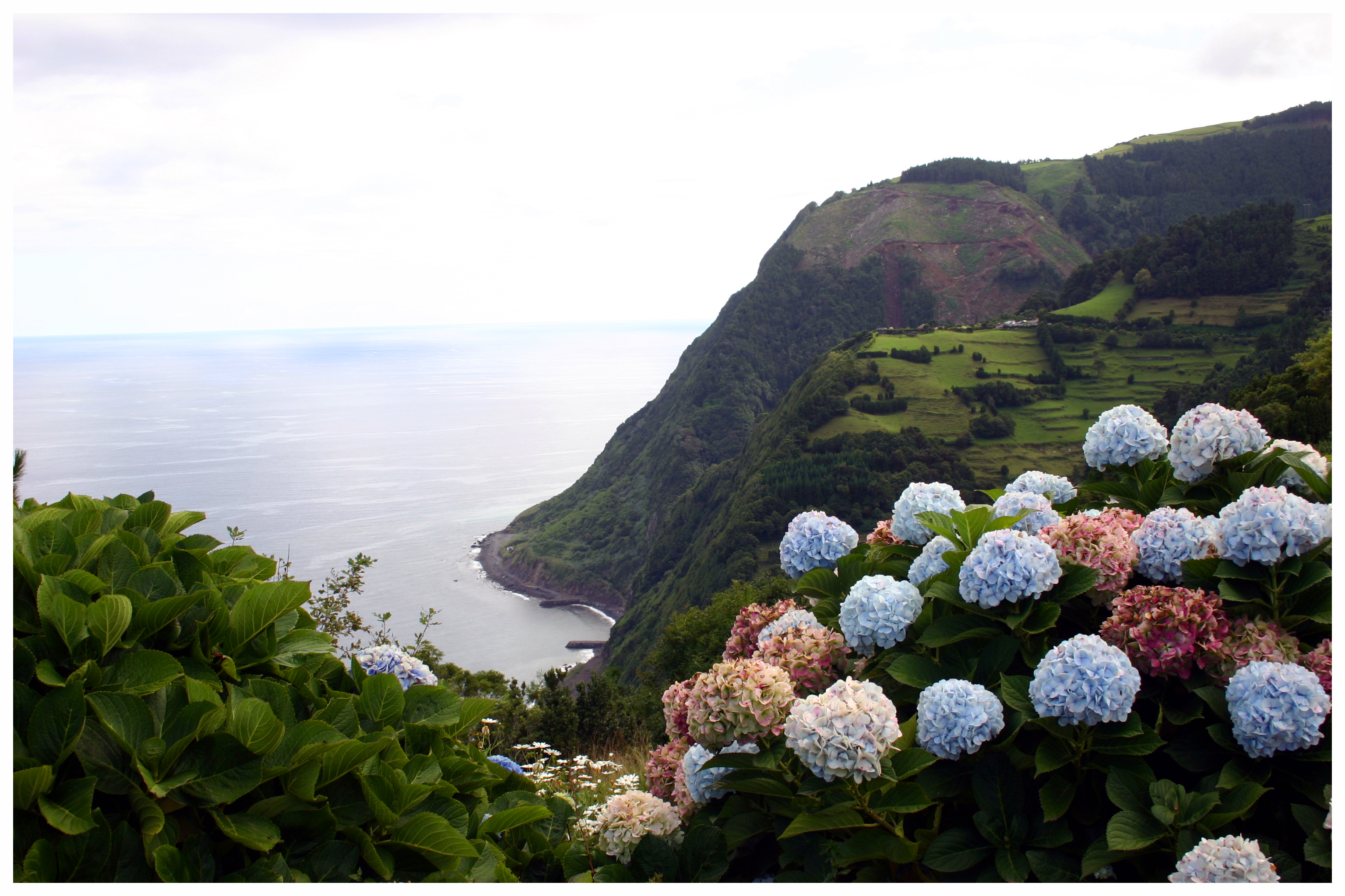 Ponta do Sossego